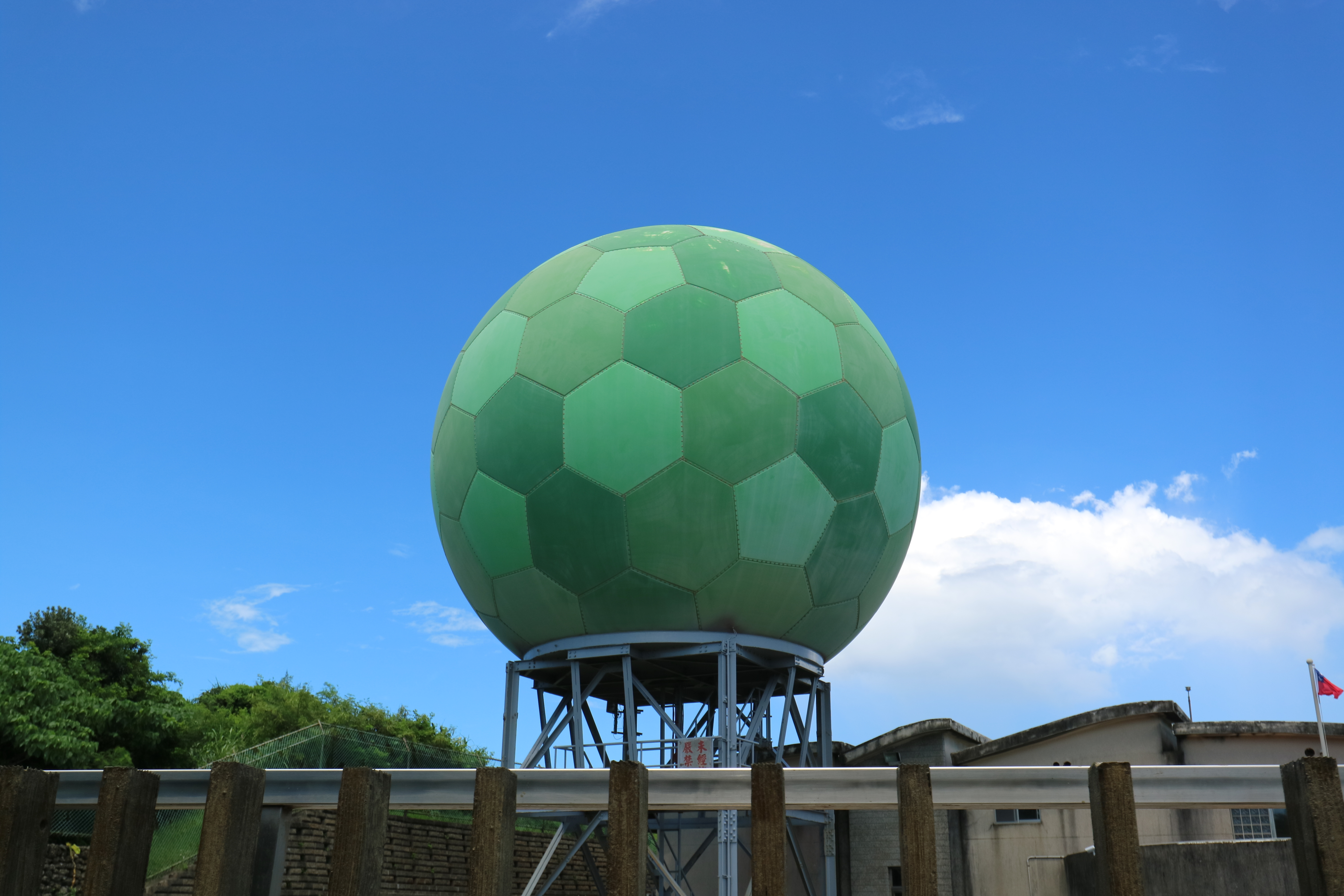 中文（台灣）: 中央氣象局墾丁氣象雷達站雷達罩